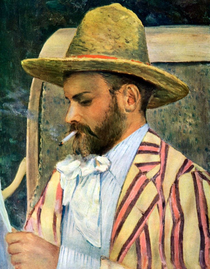 Klas Fåhraeus.